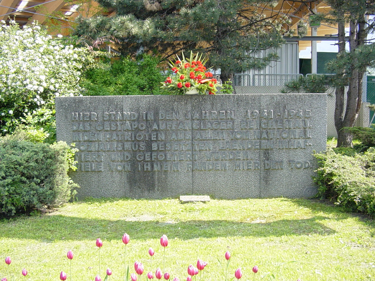 Gedenkstein zum Lager Reichenau in Amras, Innsbruck.